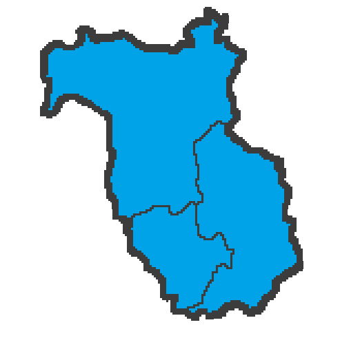 Alcaldes de Tabeirós-Tierra de Montes.